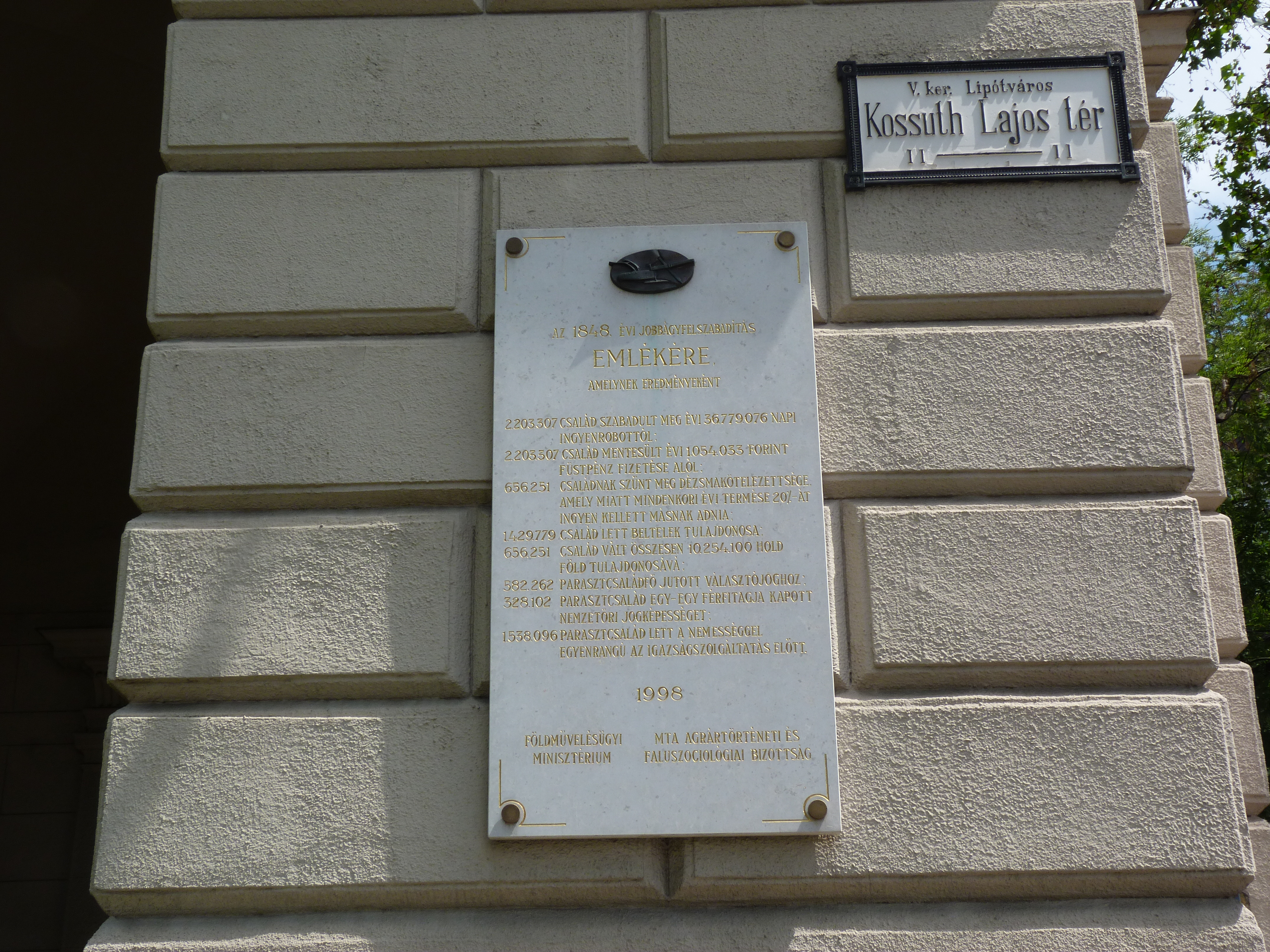 A felvétel 2012. május 19 -én készült Budapesten, a Kossuth téren. A jobbágyfelszabadítás emléklapja. ©© Derzsi Elekes Andor, Budapest, 2013